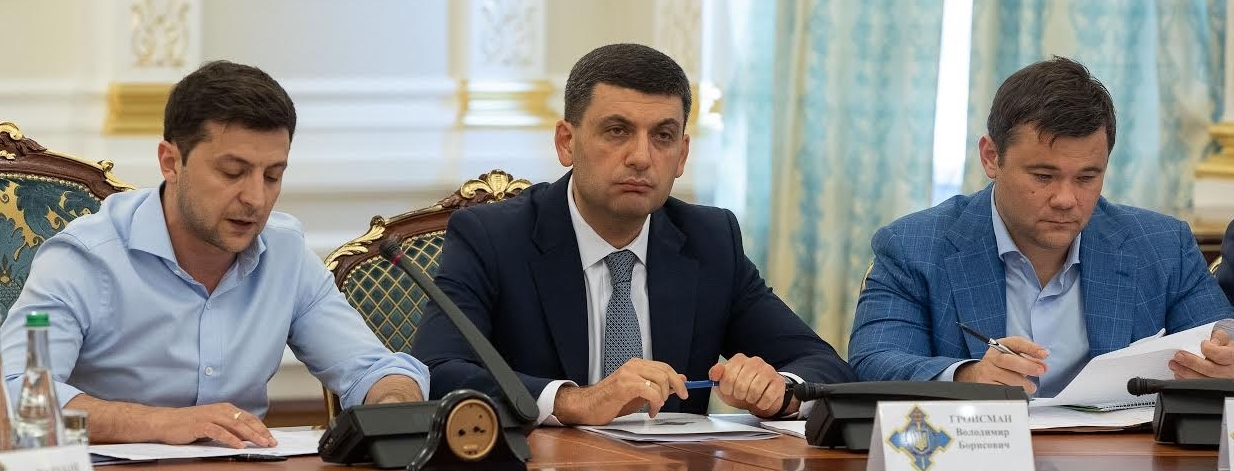 Президент Украины Владимир Зеленский провел совещание с участием членов Совета национальной безопасности и обороны Украины, посвященное энергетической безопасности.